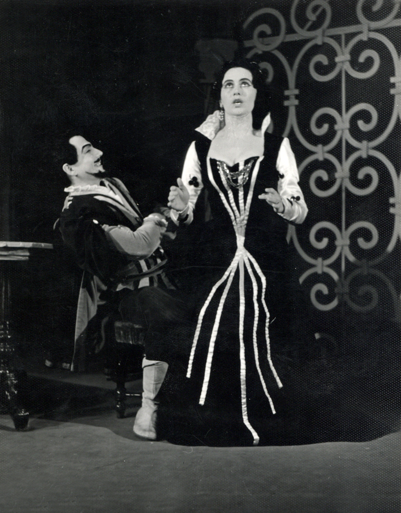 William Shakespeare, Ukročena trmoglavka, SNG v Mariboru. Na fotografiji: Boris Brunčko (Petruccio), Angelca Jenčič Janko (Katarina).